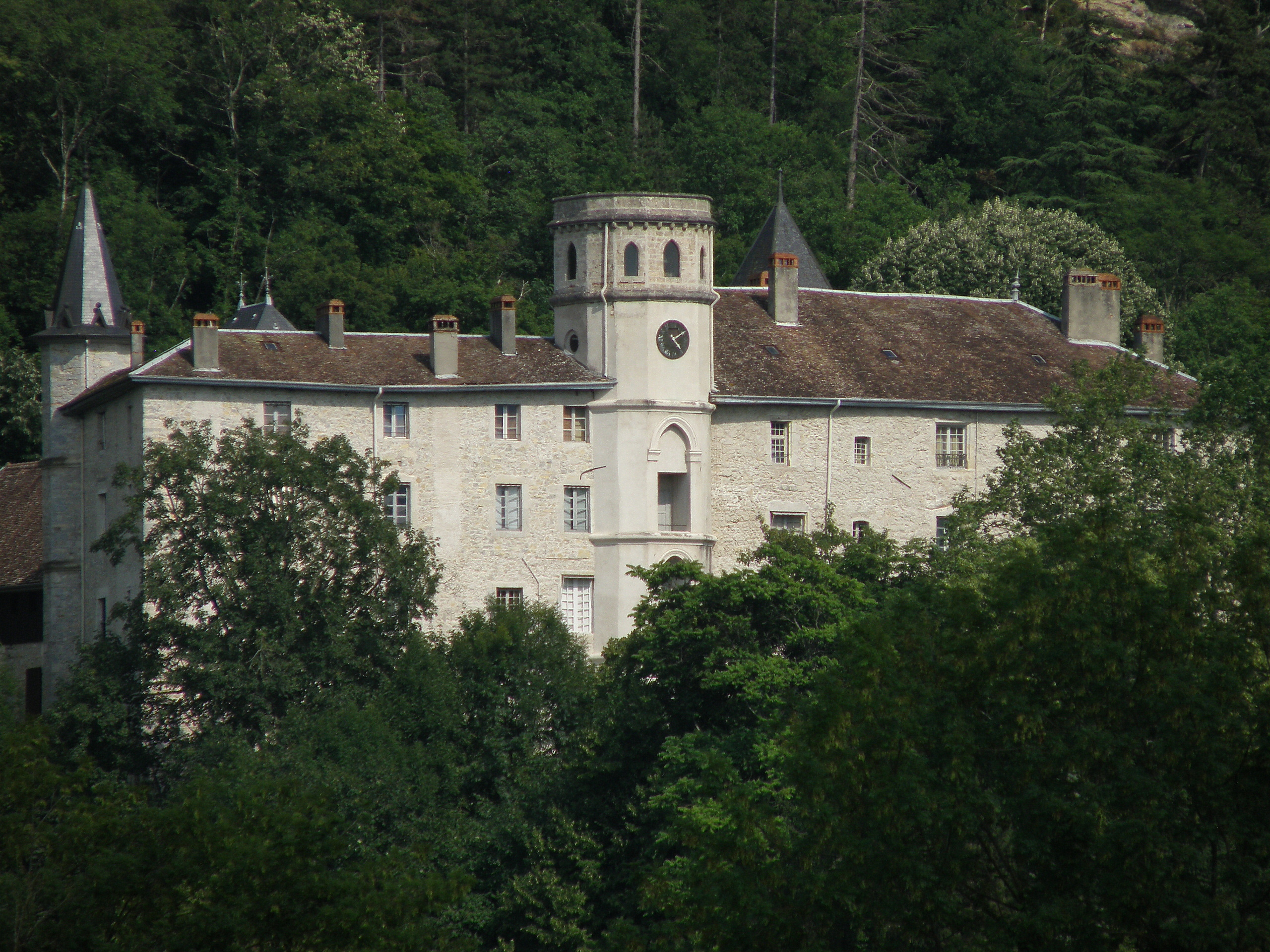 Lucey, comm. du département de la Savoie (région Rhônes-Alpes, France). Château.